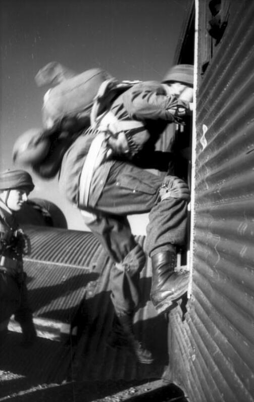 Fallschirmjäger für Leros! Fallschirmjäger machen sich start klar